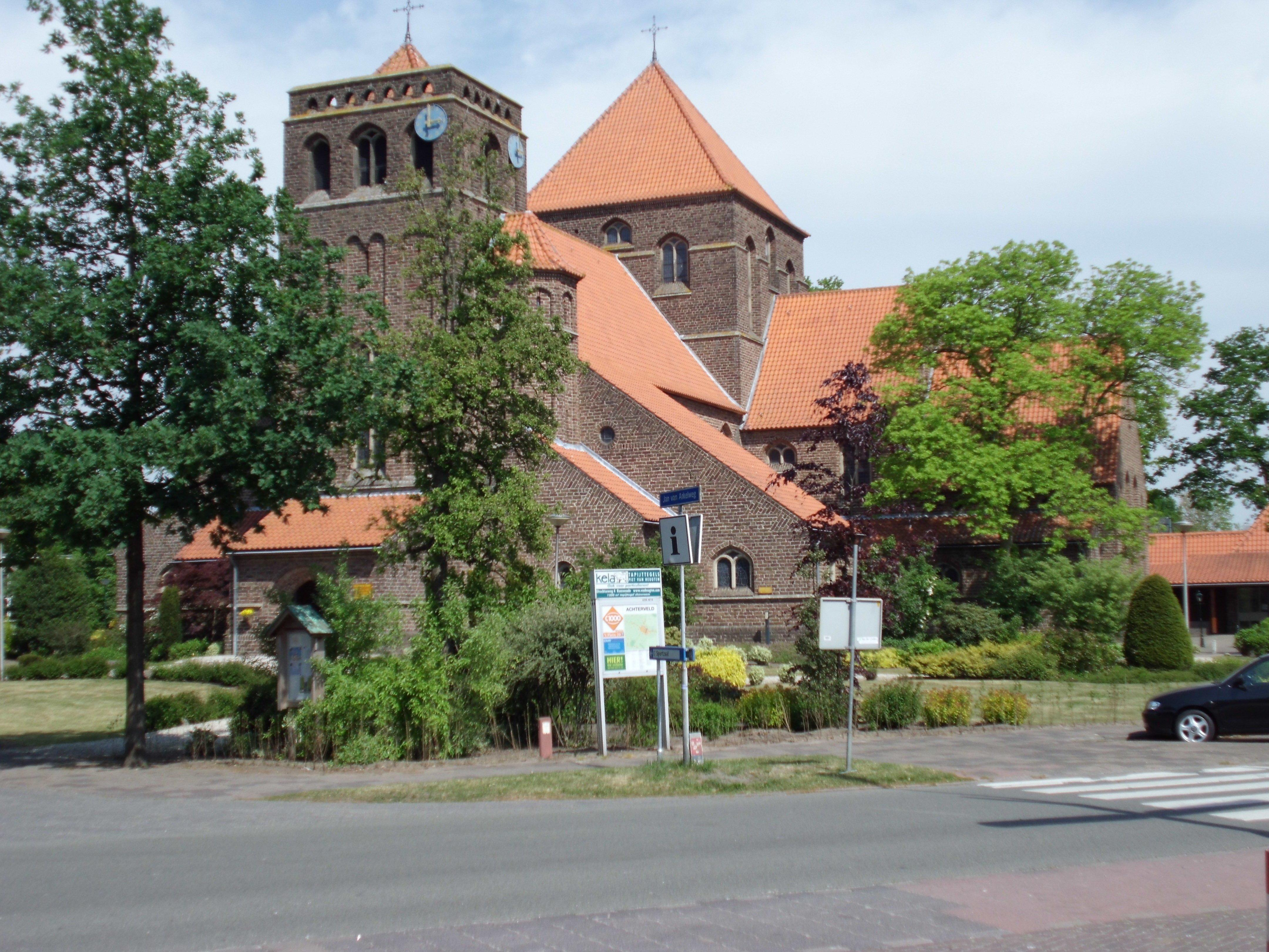 Zicht op een deel van de Sint-Jozefkerk aan de Hessenweg 325 in het centrum van Achterveld (Leusden)